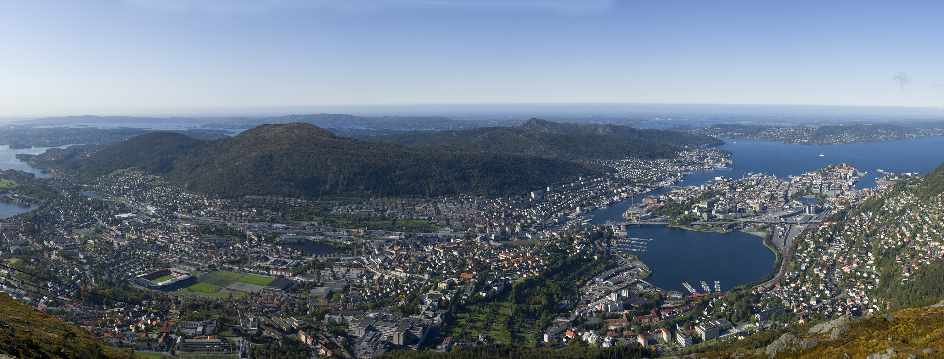 Bergen seen from Ulriken